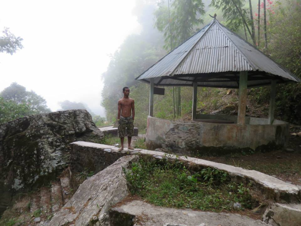 Remexio Vila